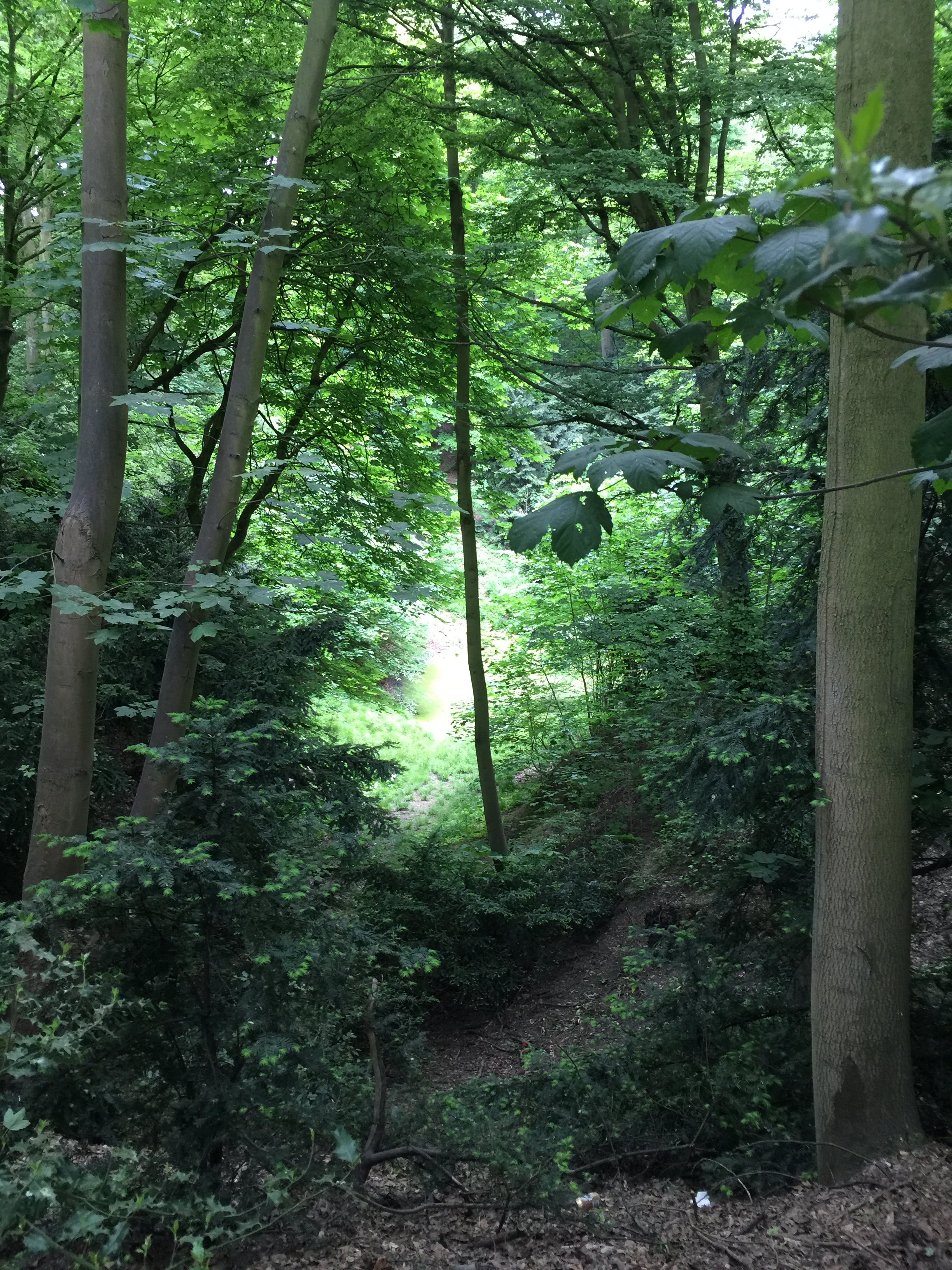 Ravin du Diable. Laissé par une ancienne carrière, ce trou, où stagne une mare, porte ce nom car on lui attribue des origines diaboliques.